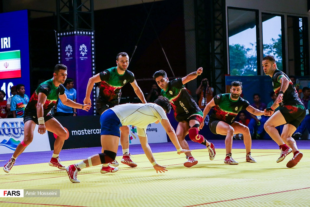 تیم ملی کبدی مردان ایران در بازیهای آسیایی جاکارتا ۲۰۱۸